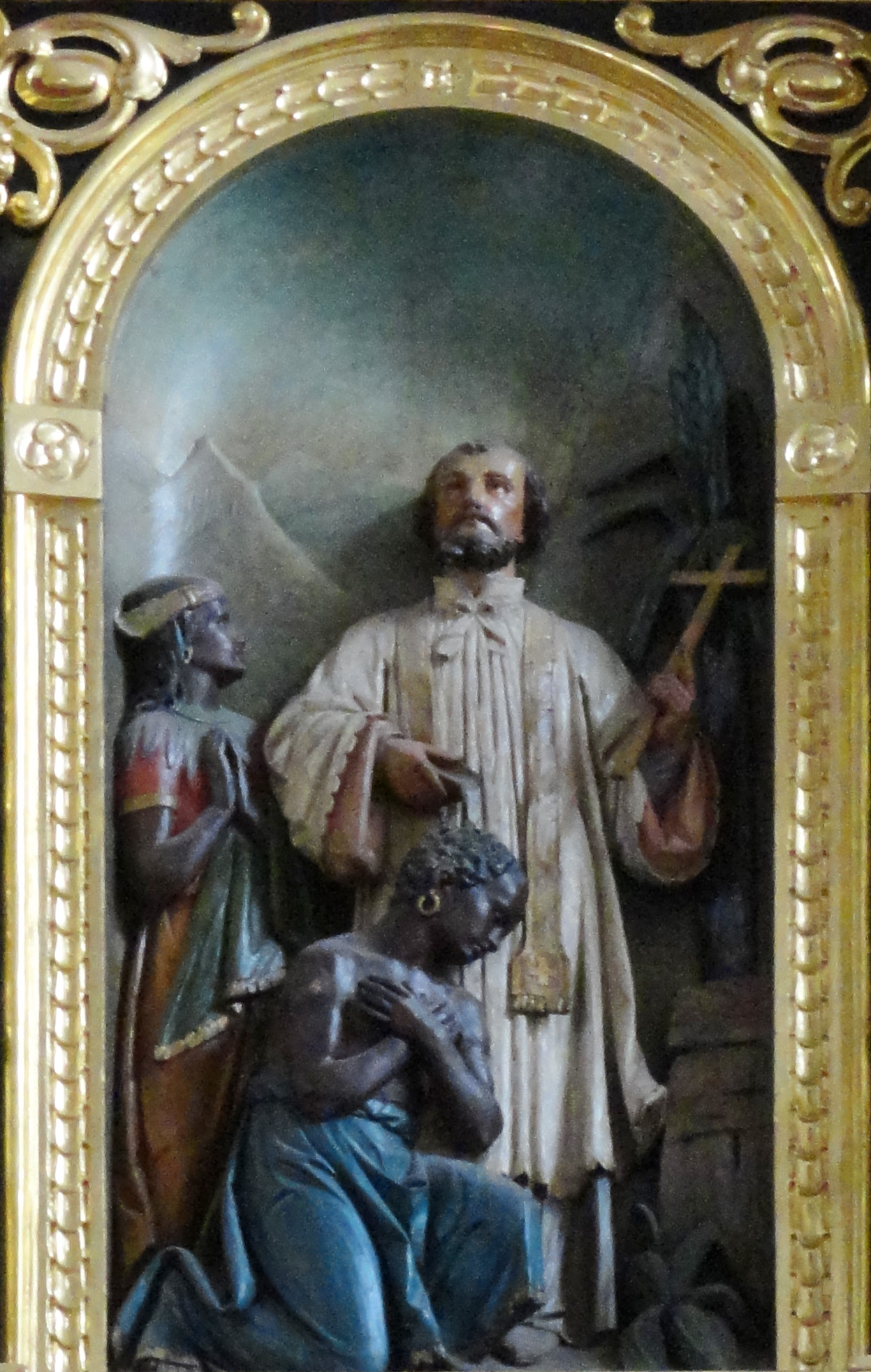 Holzrelief rechter Seitenaltar im oberen Ausszug